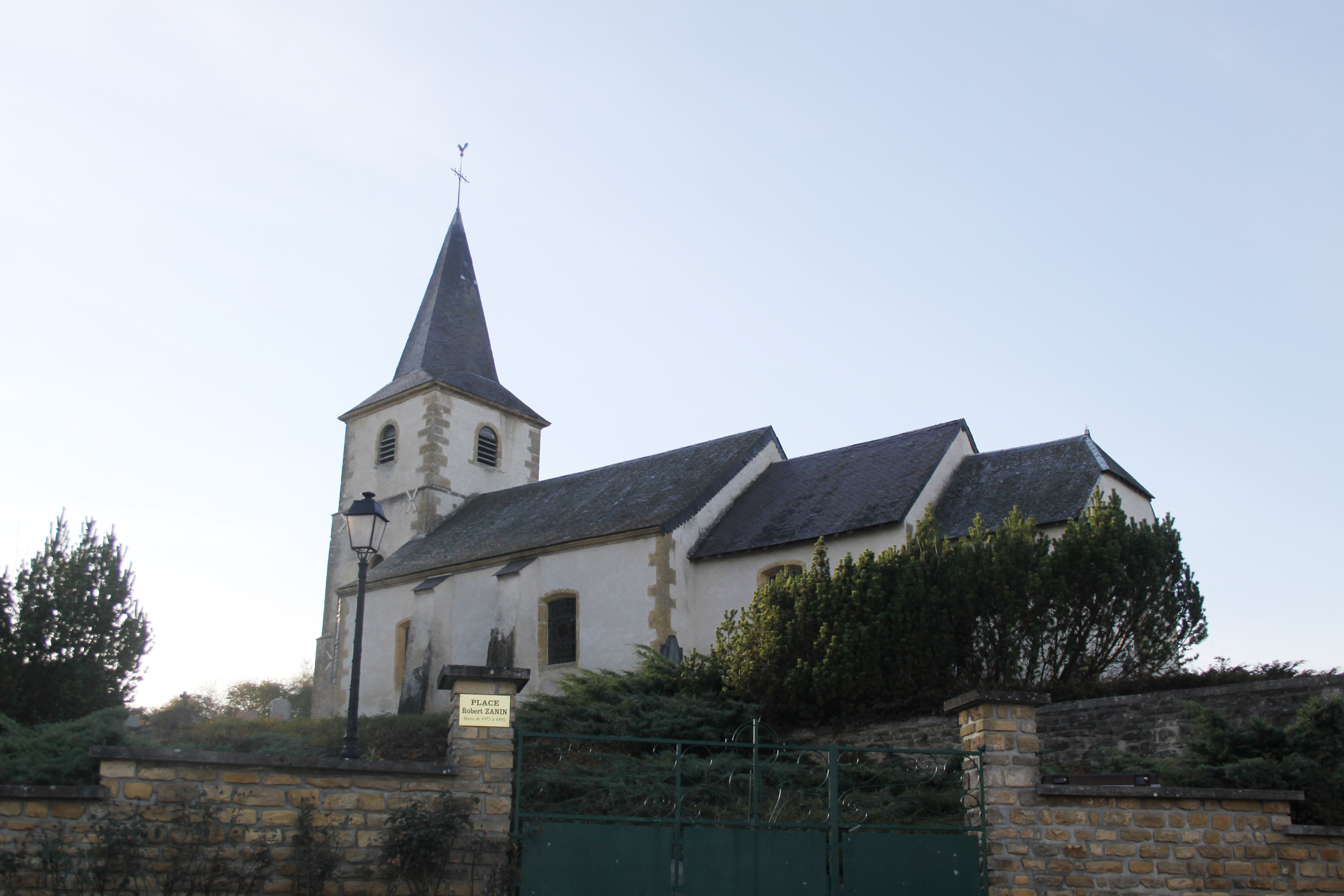 Village Ardennais